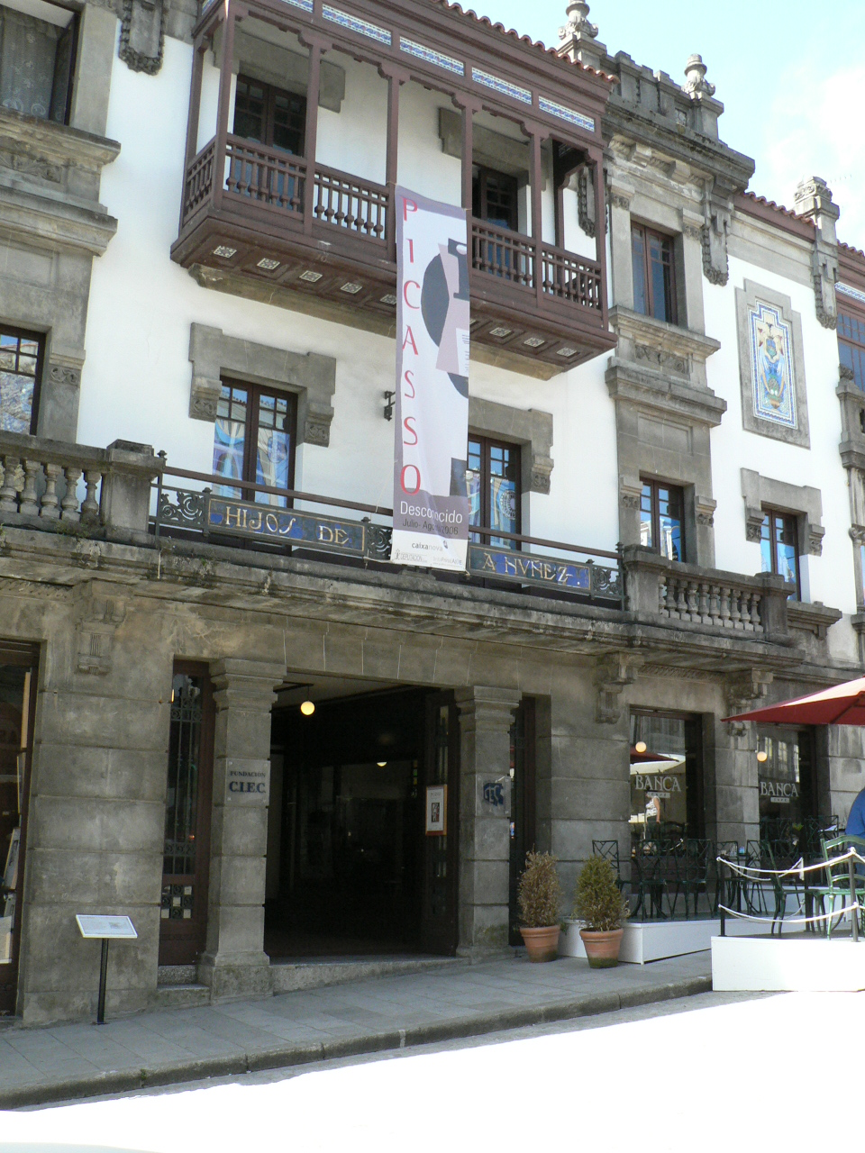 Ruas de Betanzos